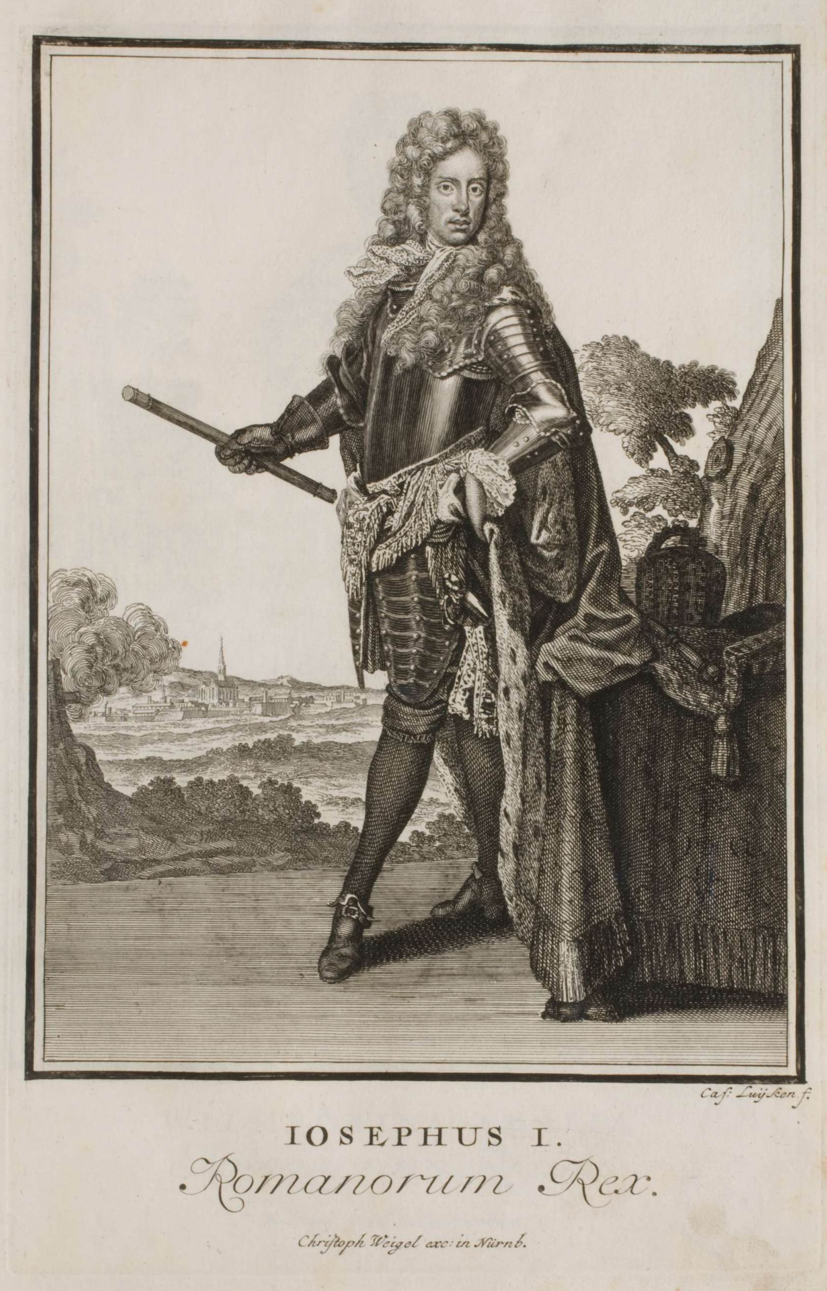 Neu-eröffnete Welt-Galleria. ..., Nürnberg 1703. 4. Josephus I. Romanorum Rex.